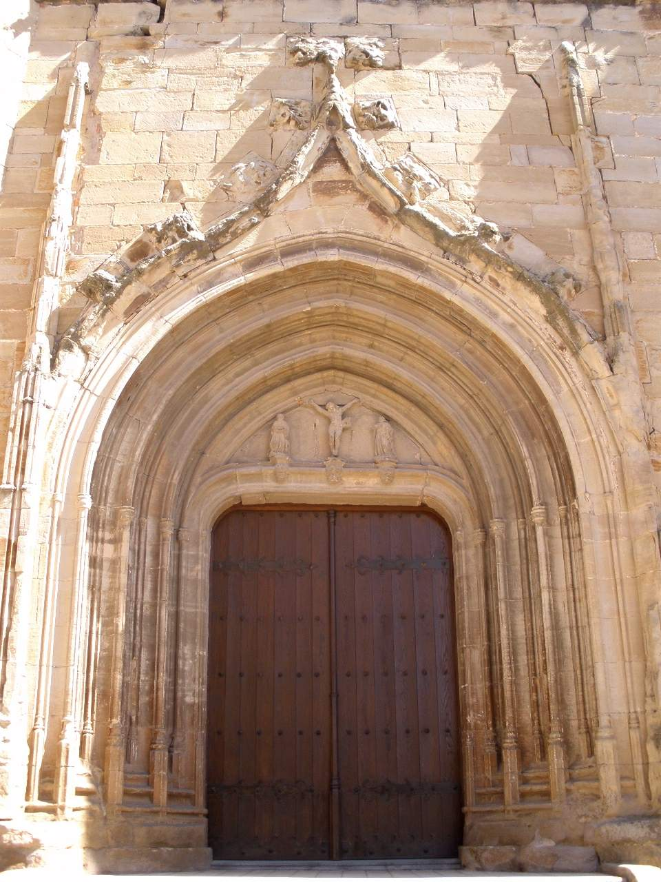 Iglesia de Nuestra Señora de la Asuncion (Villamedina de Iregua)